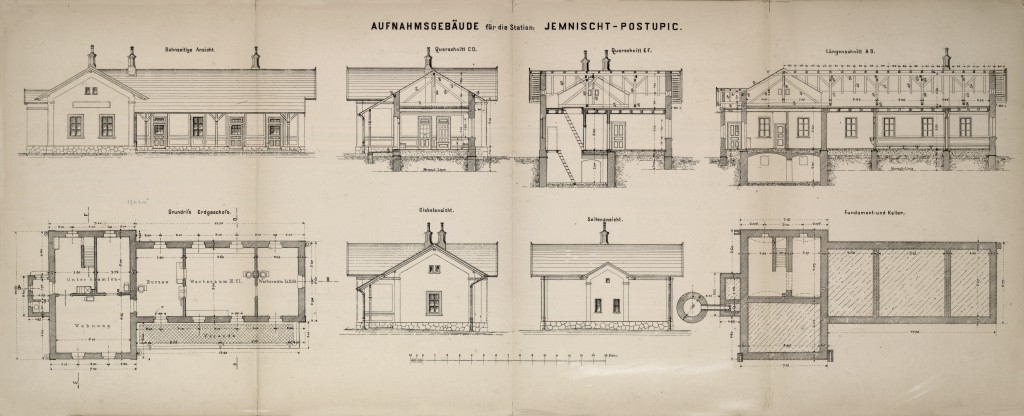 Postupice, výkres nádražní budovy z doby výstavby